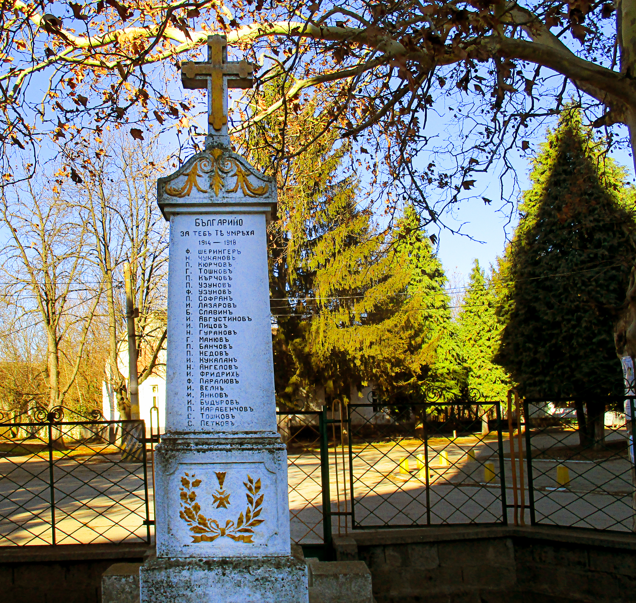 Паметник на загиналите във войните